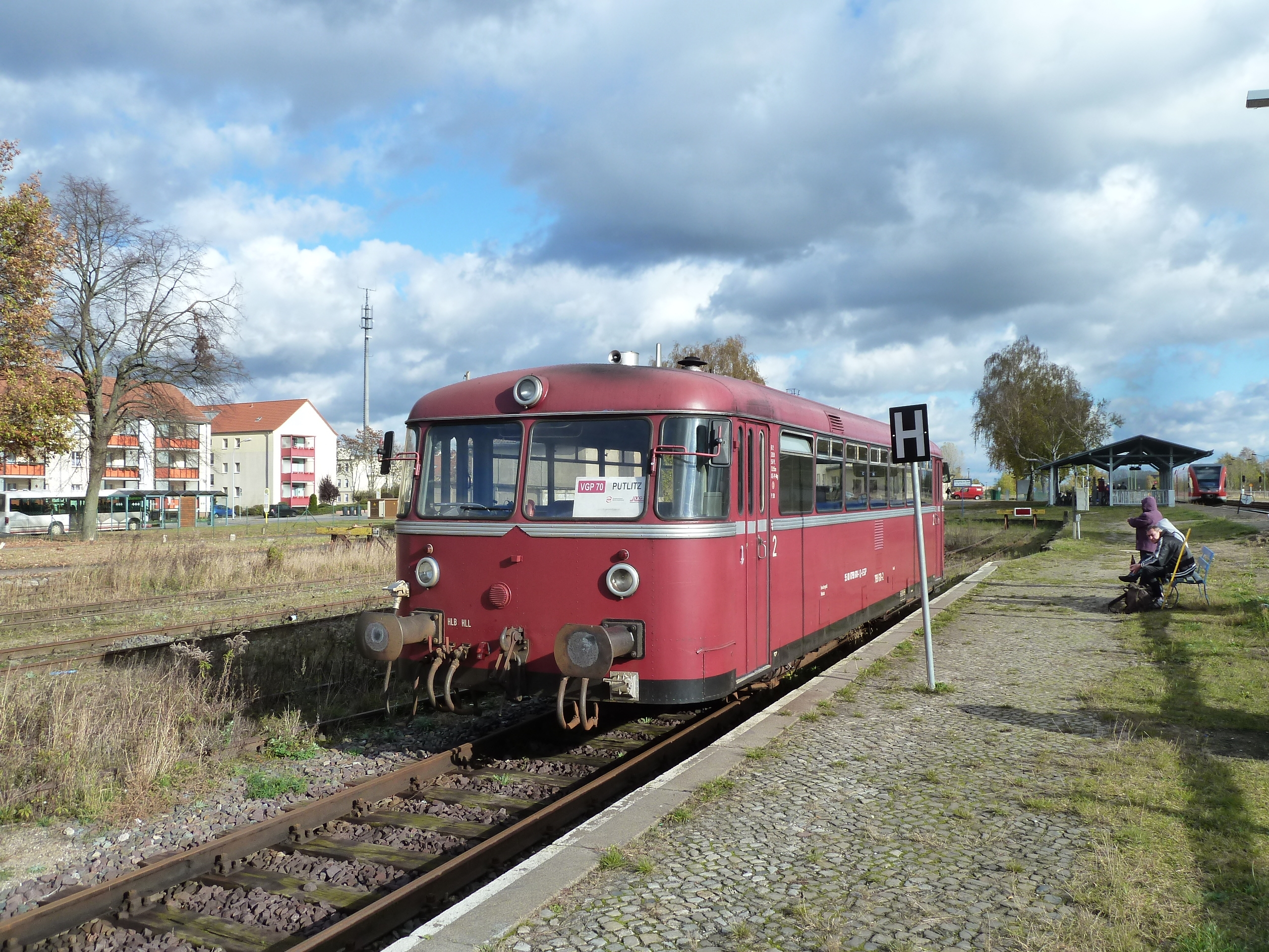 Bahnhof Pritzwalk, Putlitzer Bahnsteig